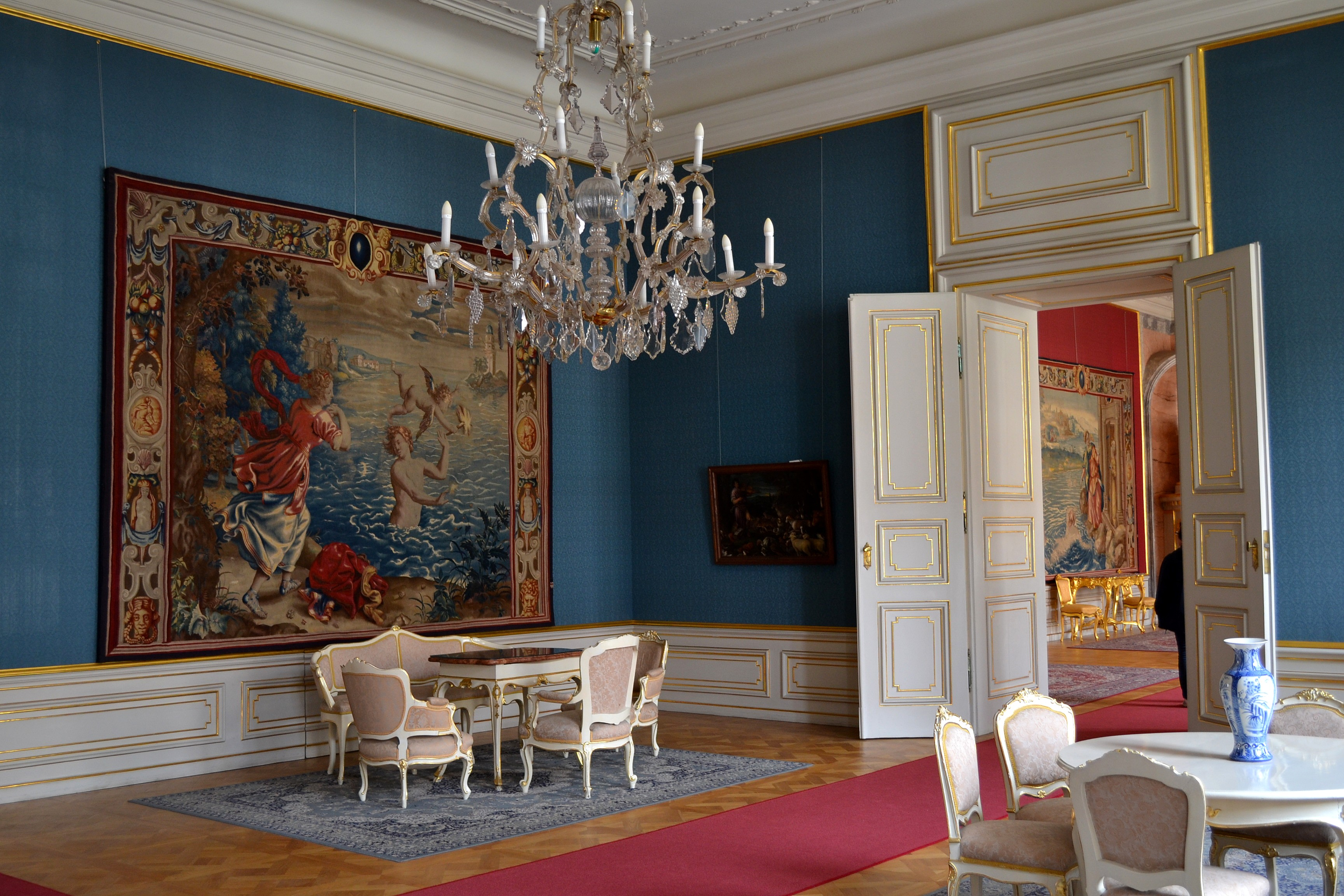 Pohľad do interiéru Primaciálneho paláca - sieň s gobelínmi